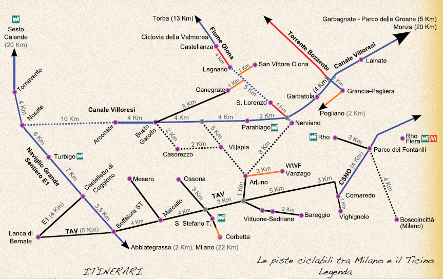 Mappa della pista ciclabile del Parco dei Mulini - Provincia di Milano e Varese - Lombardia - Italia